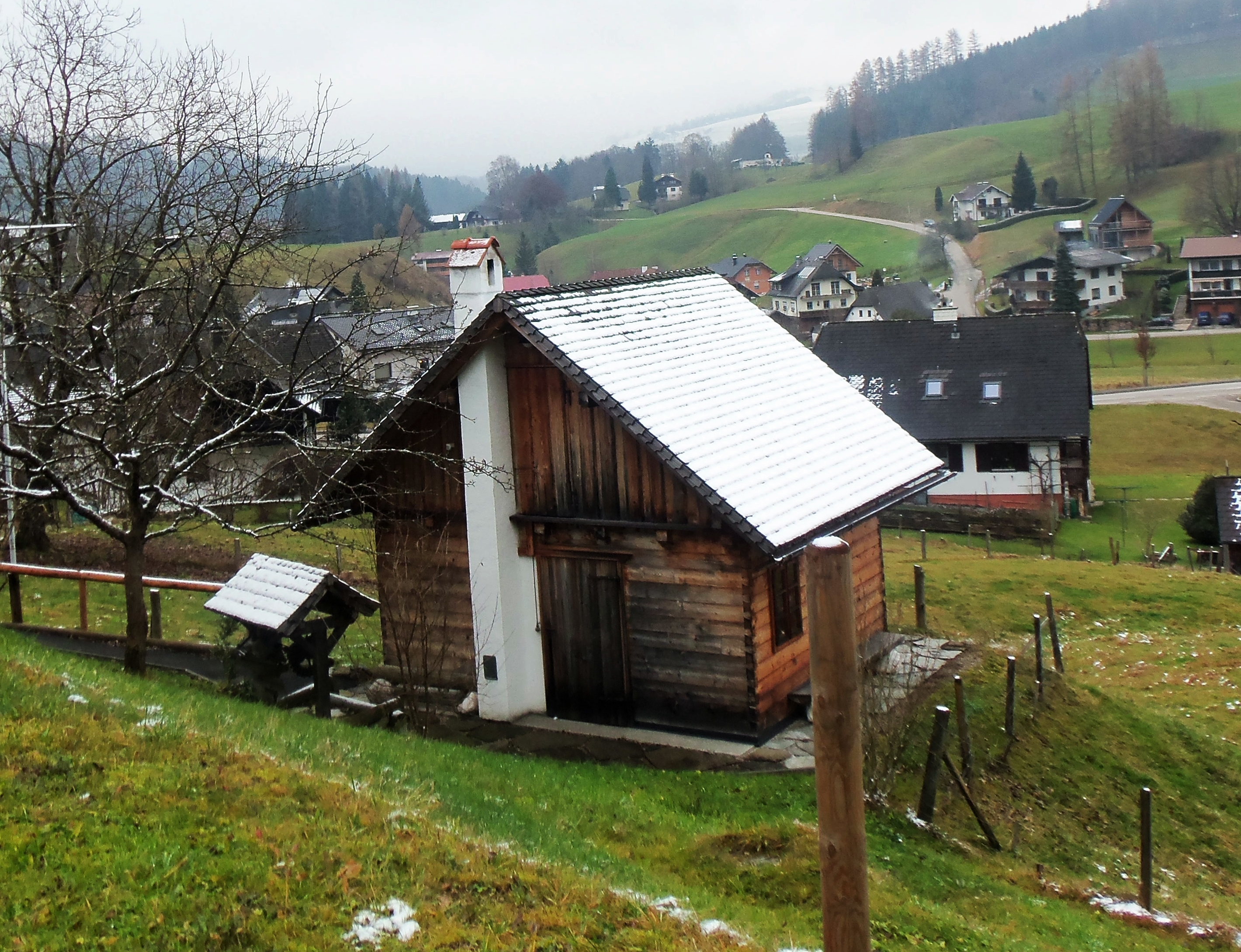 Heimathaus Werkstatt